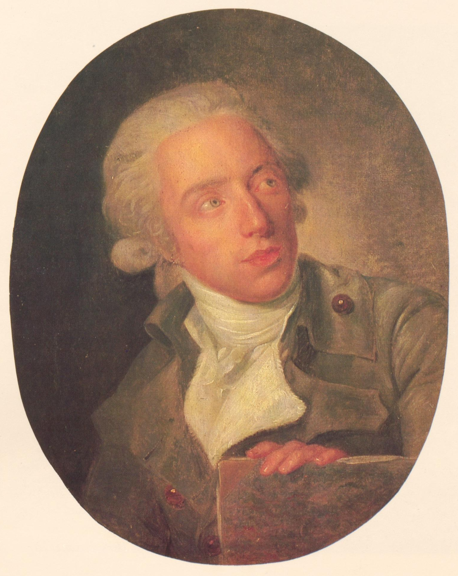 Viktor Heideloff, Porträt von Unbekannt, vermutlich von Philipp Friedrich Hetsch, vor 1817.